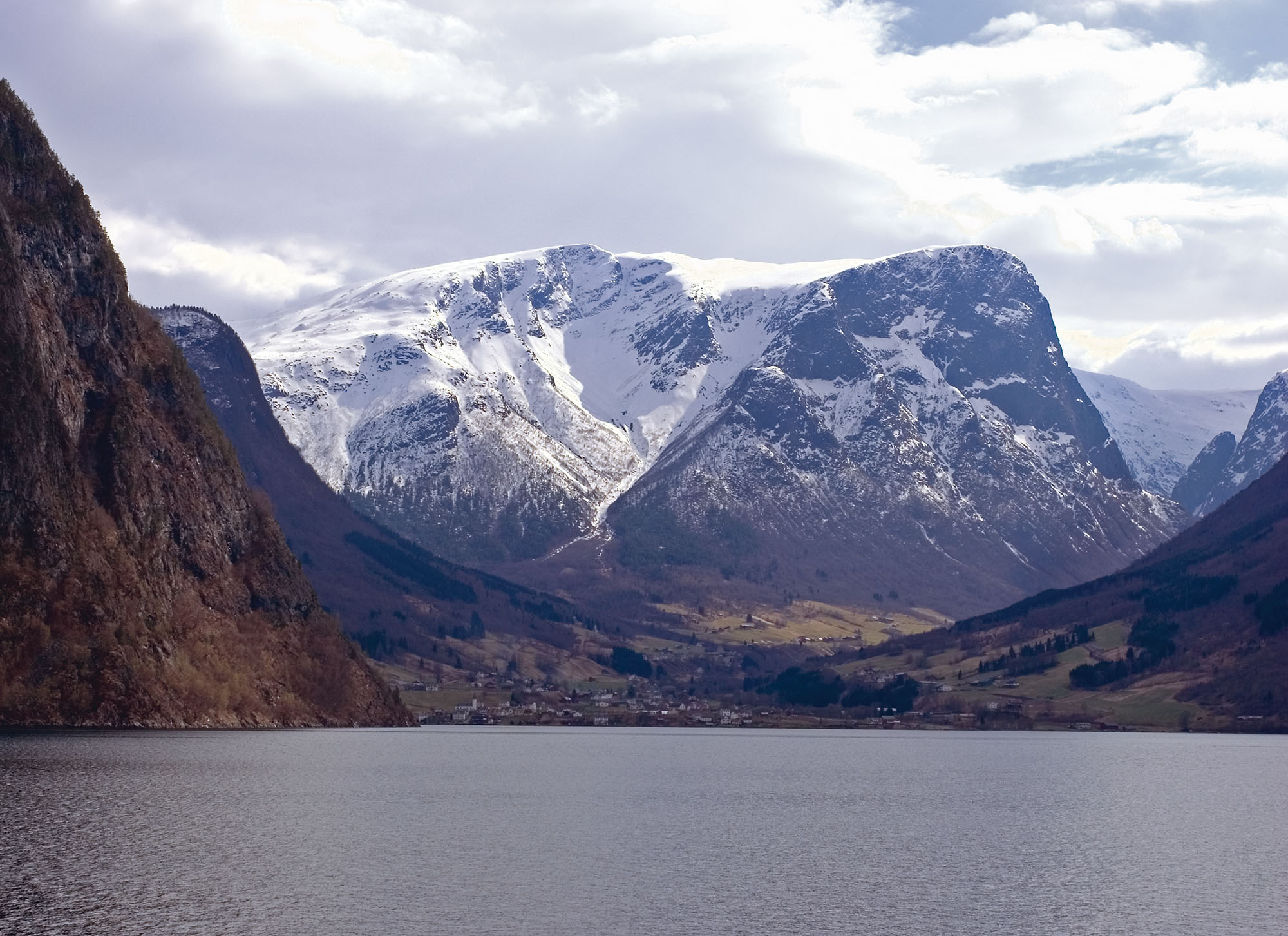 Fresvik / Norway